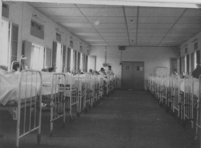 תל השומר כבית חולים צבאי